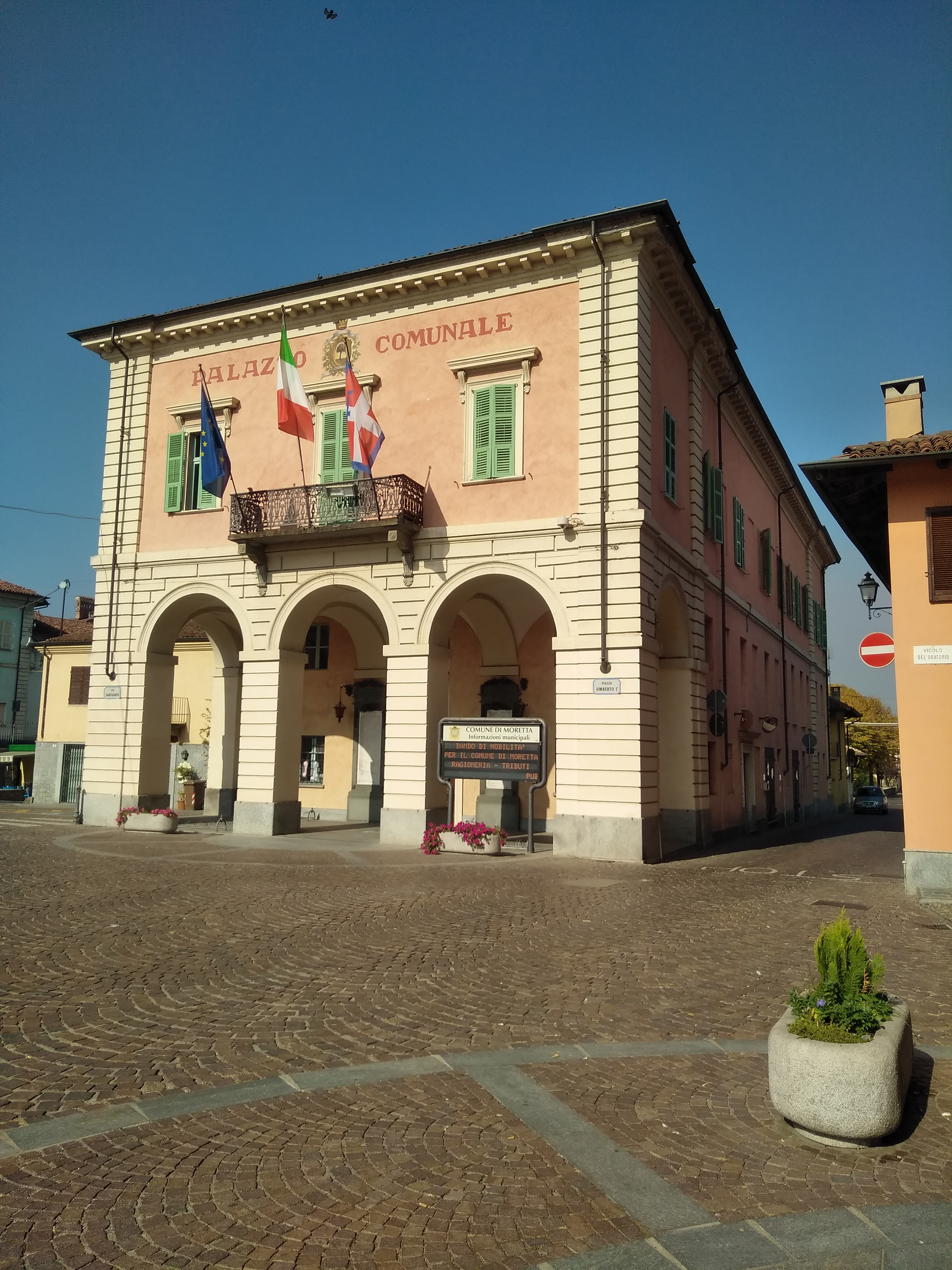 Moretta (CN): il municipio